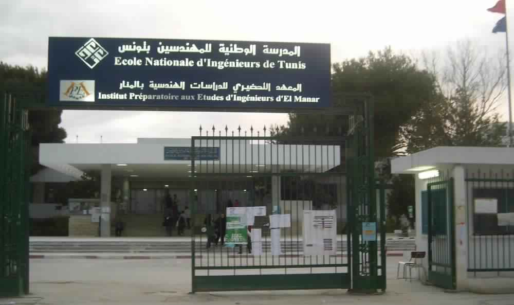 بوابة المدرسة الوطنية للمندسين بتونس